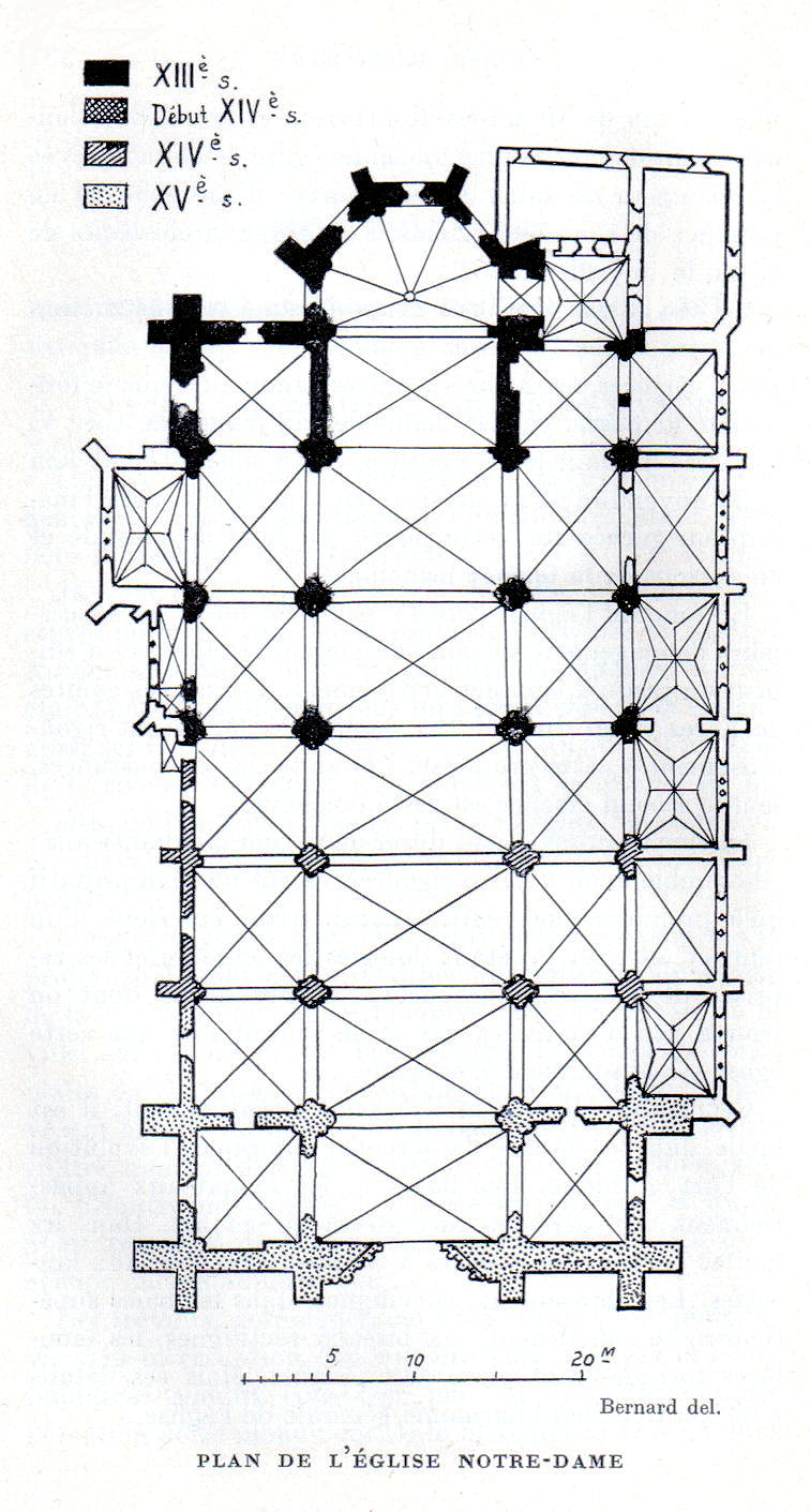 Montbrison - Collégiale Notre-Dame d'Espérance - Plan (Congrès archéologique de France - 1935)